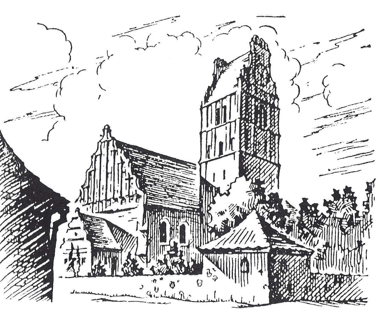 Federzeichnung der (früher) evangelischen Pfarrkirche in Neidenburg